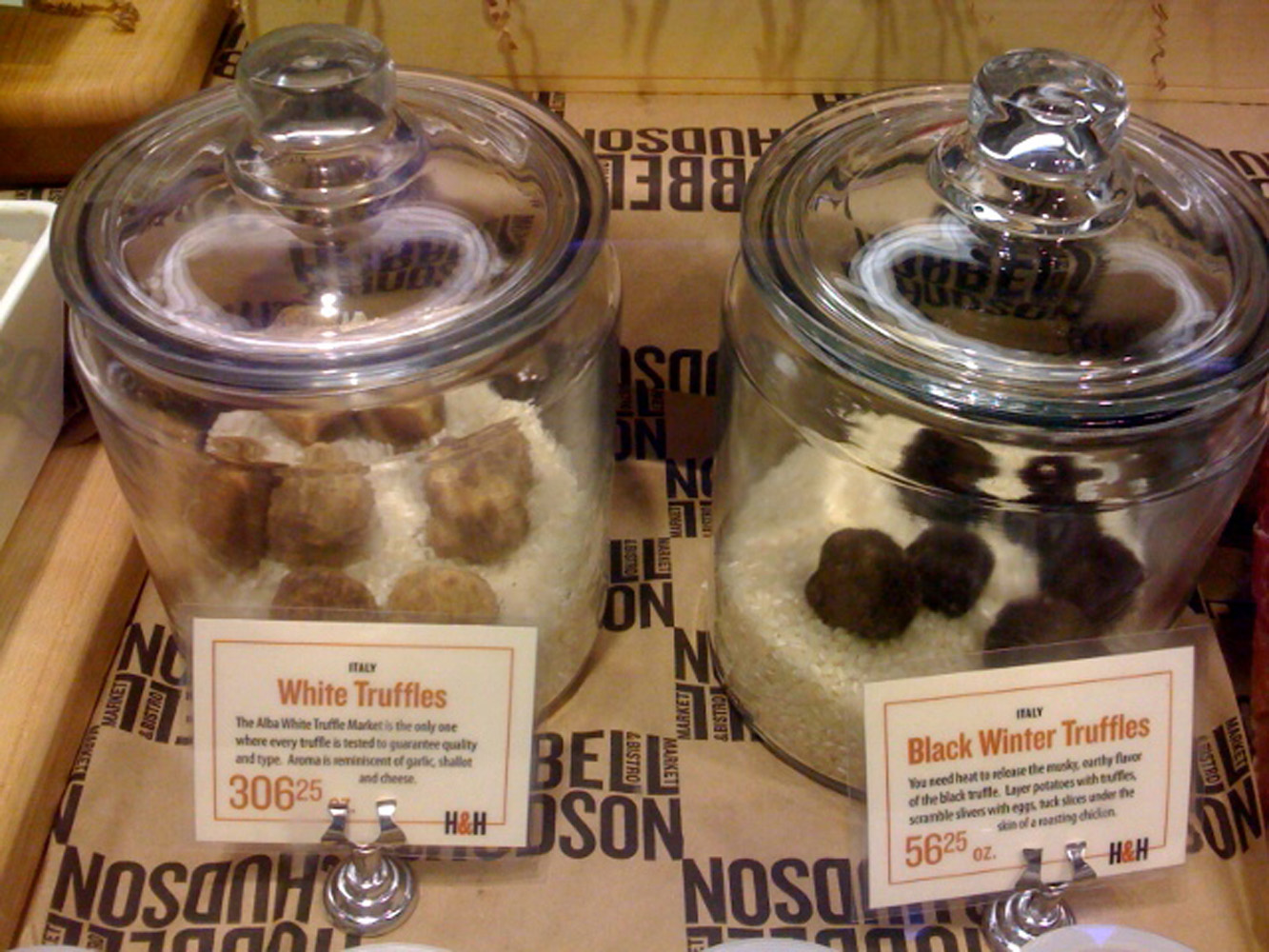 Truffes blanches et noires